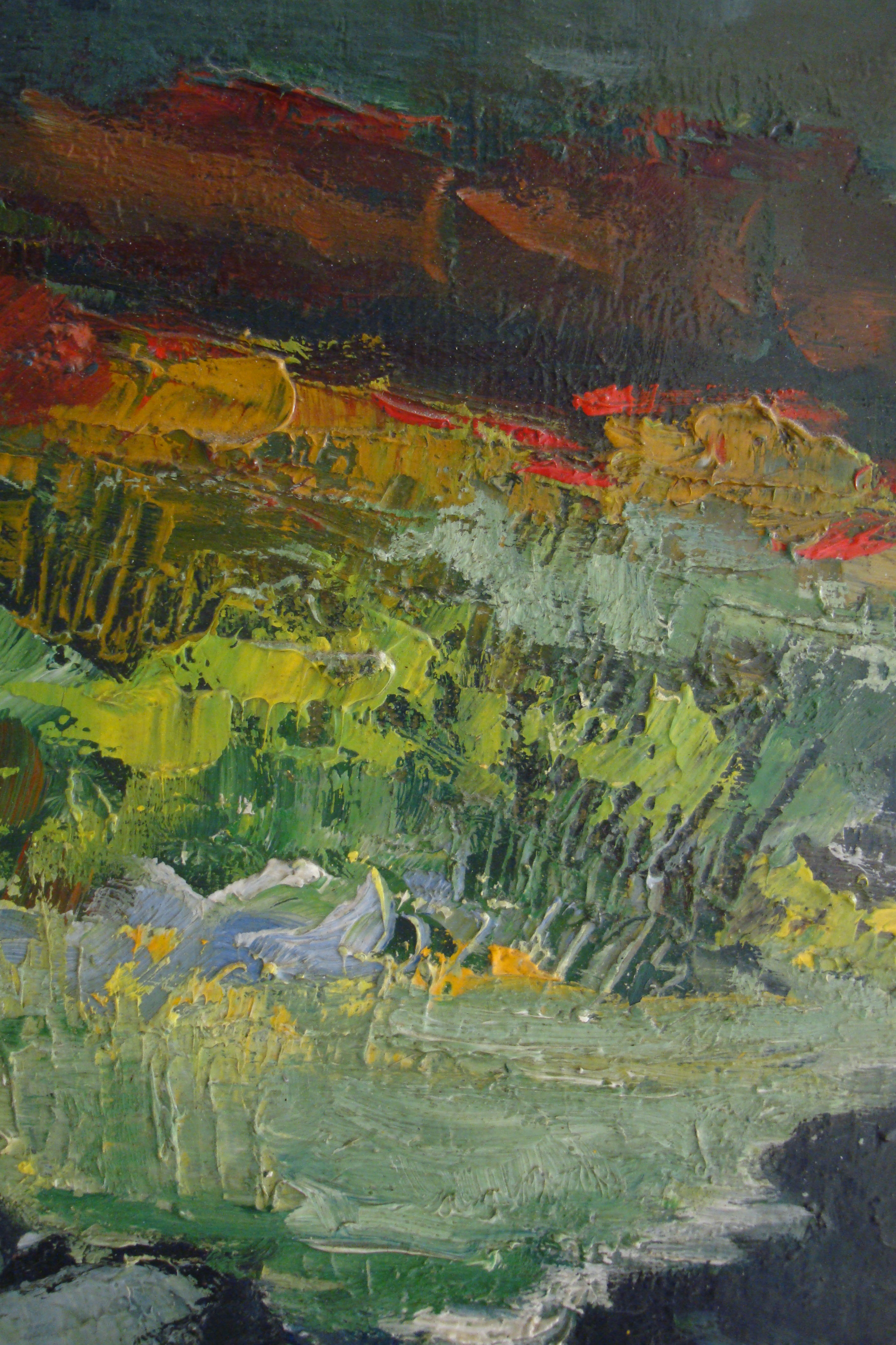 détail d'une peinture à l' huile sur toile